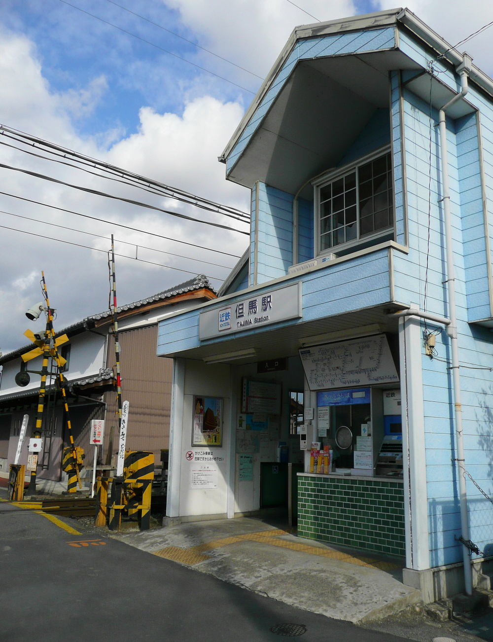 Kinki Nippon Railway,Tawaramoto Line,Tajima Station. /近鉄田原本線（たわらもとせん）但馬駅